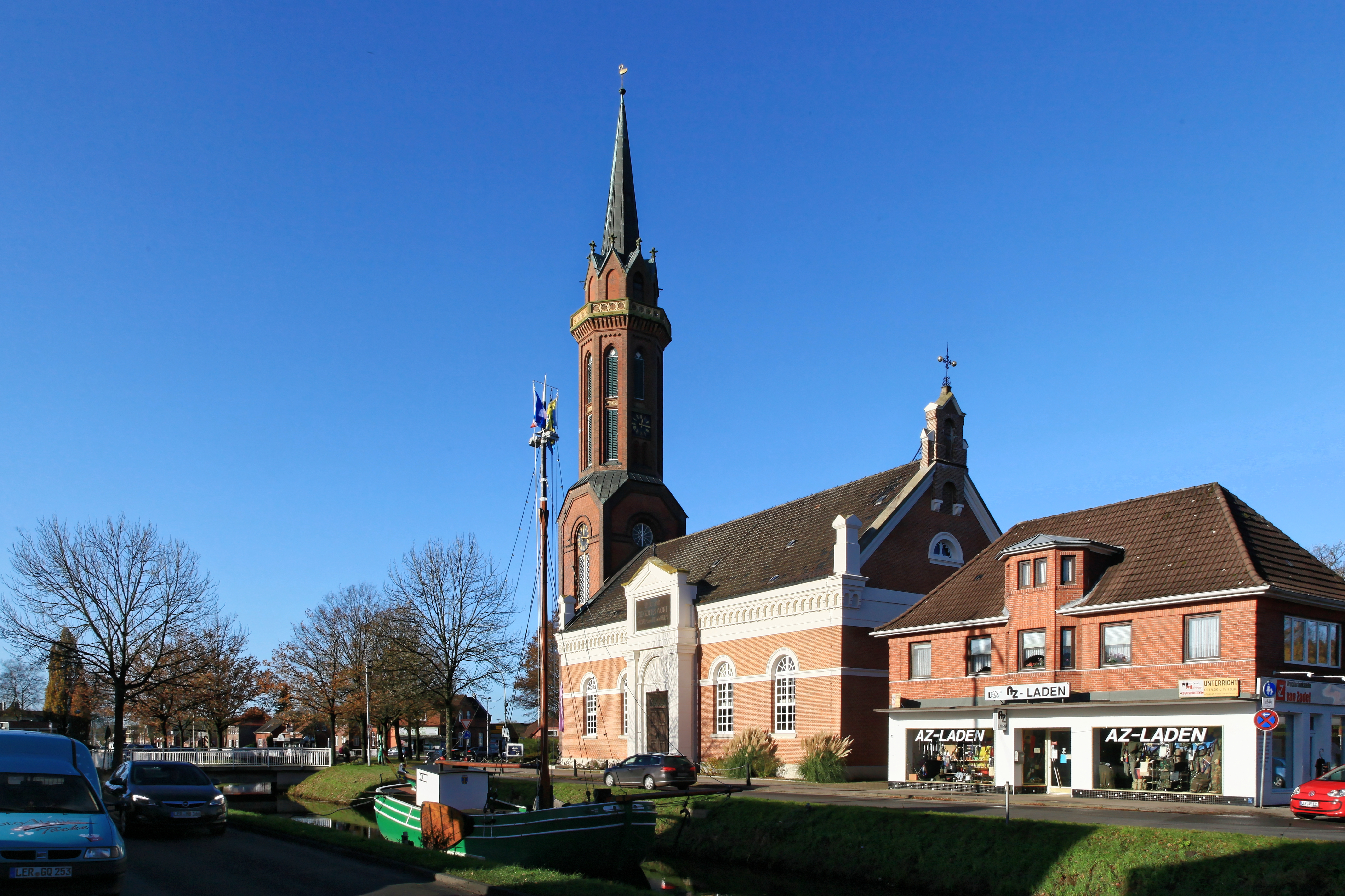 Tjalk Engelina im Westrhauderfehnkanal am Untenende bei der Hoffnungskirche in Rhauderfehn